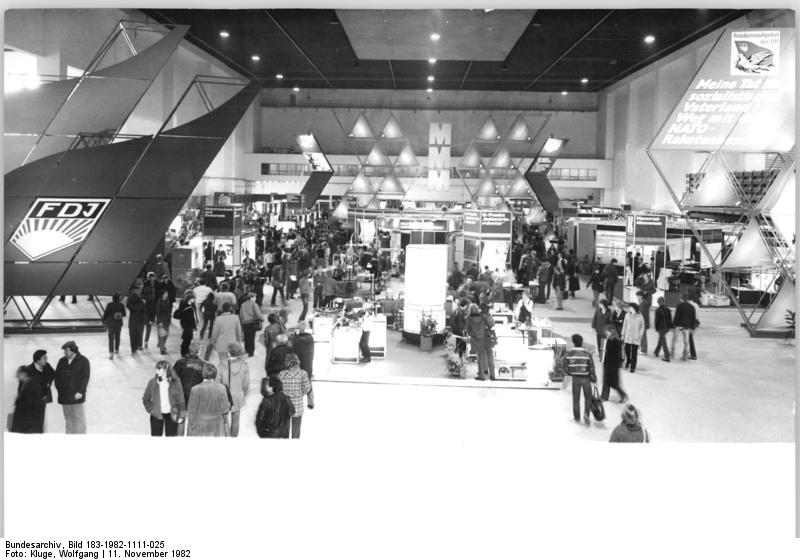 Leipzig, Messe der Meister von morgen ADN-ZB Kluge 11.11.82 Leipzig: Jugend-Zum 25. Mal findet derzeit die Zentrale Messe der Meister von morgen statt. In sechs Hallen auf dem Messegelände, hier der Blick vom Haupteingang in die Halle 2, sind Exponate zu sehen, die die Meisterung des wissenschaftlich-technischen Fortschritts durch junge Neuerer dokumentieren und erste Abrechnungen der Initiativen im Friedensaufgebot der FDJ darstellen.